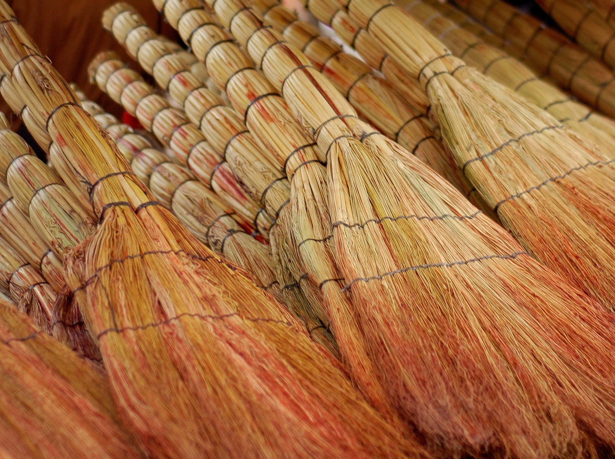 Brooms for sale in a Tbilisi market.